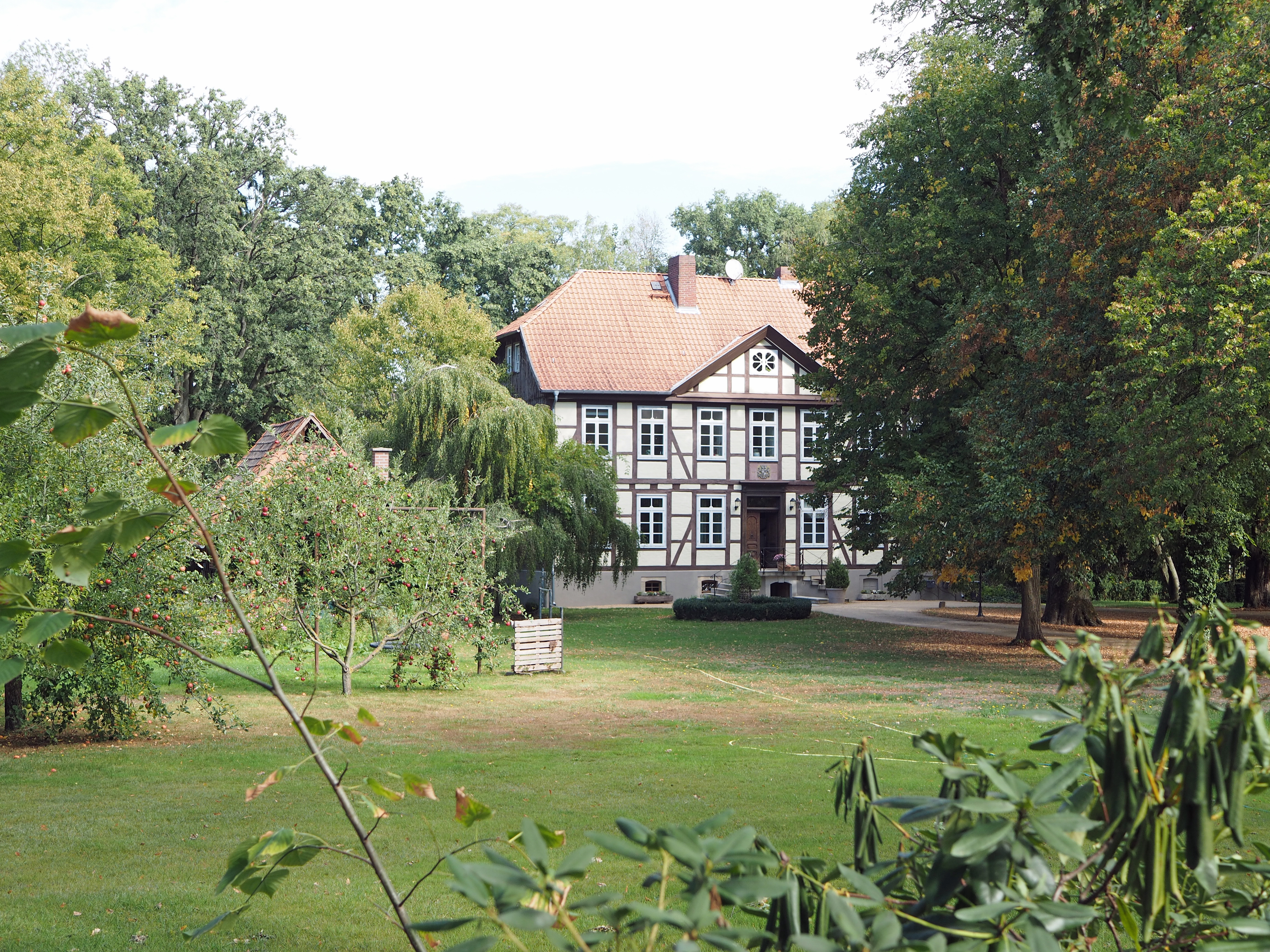 Herrenhaus Rittergut Hohne, in Hohne Gemeinde Lachendorf (Landkreis Celle)